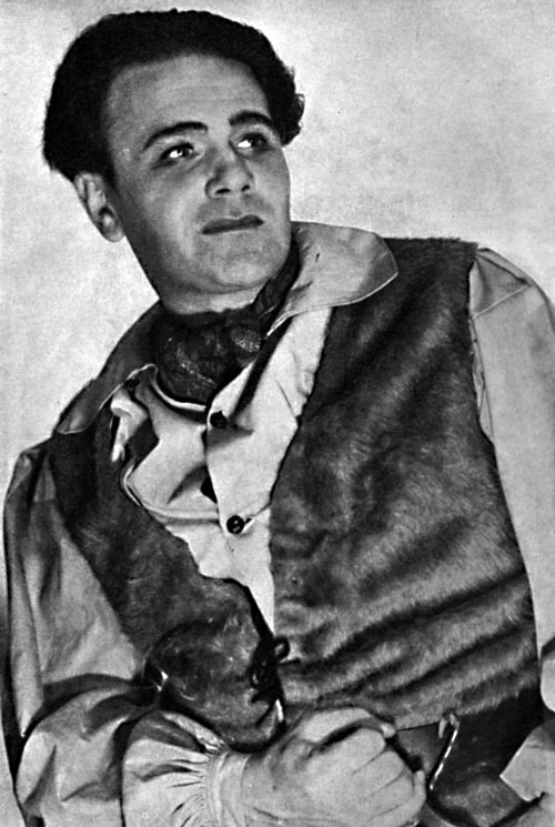 Conny Söderström som Pedro i operan Låglandet